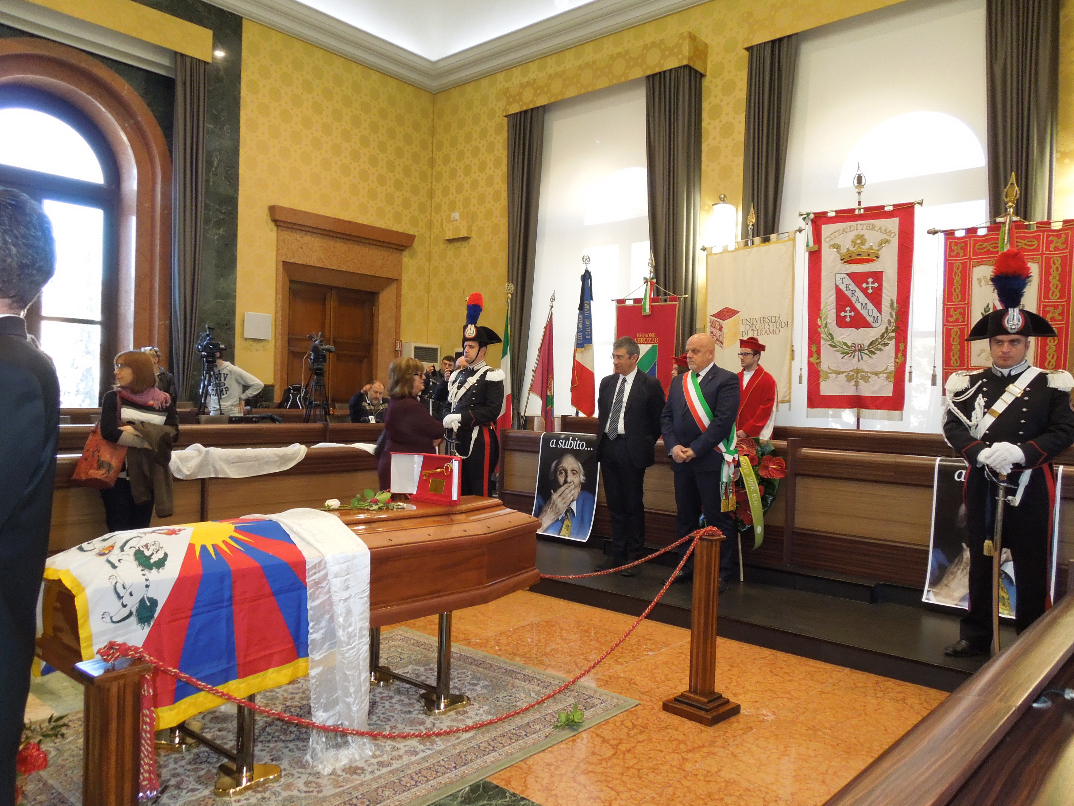 Camera ardente per Marco Pannella, allestita presso la Sala Consiliare del Municio di Teramo.